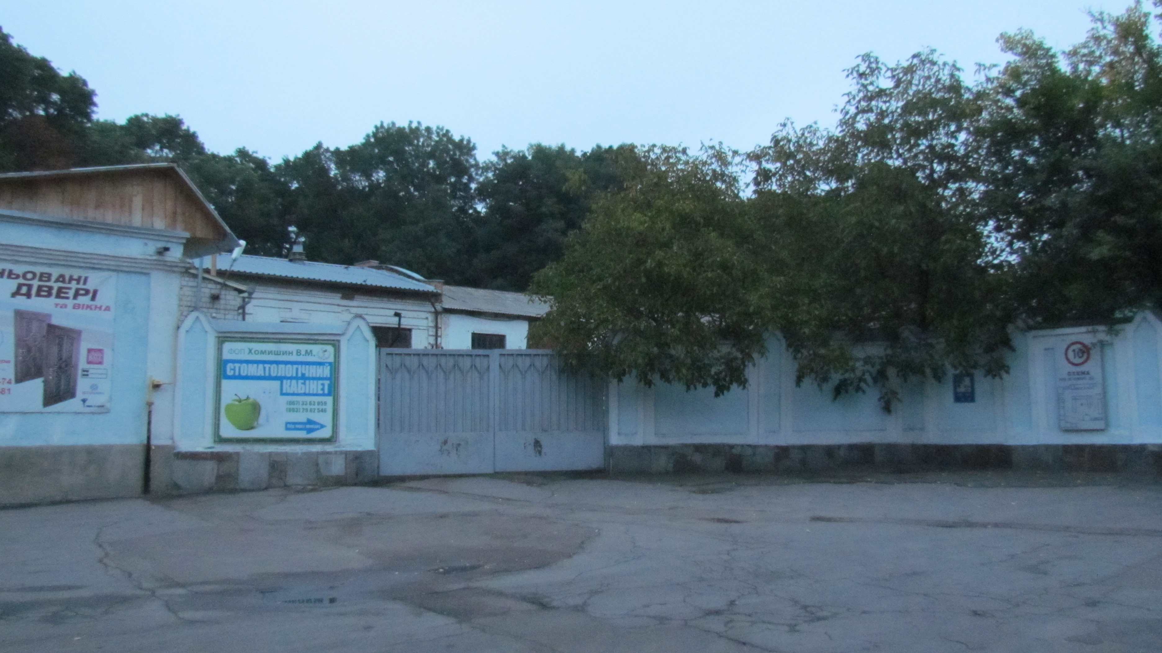 Ямські служби, Житомир, вул. Перемоги, 72